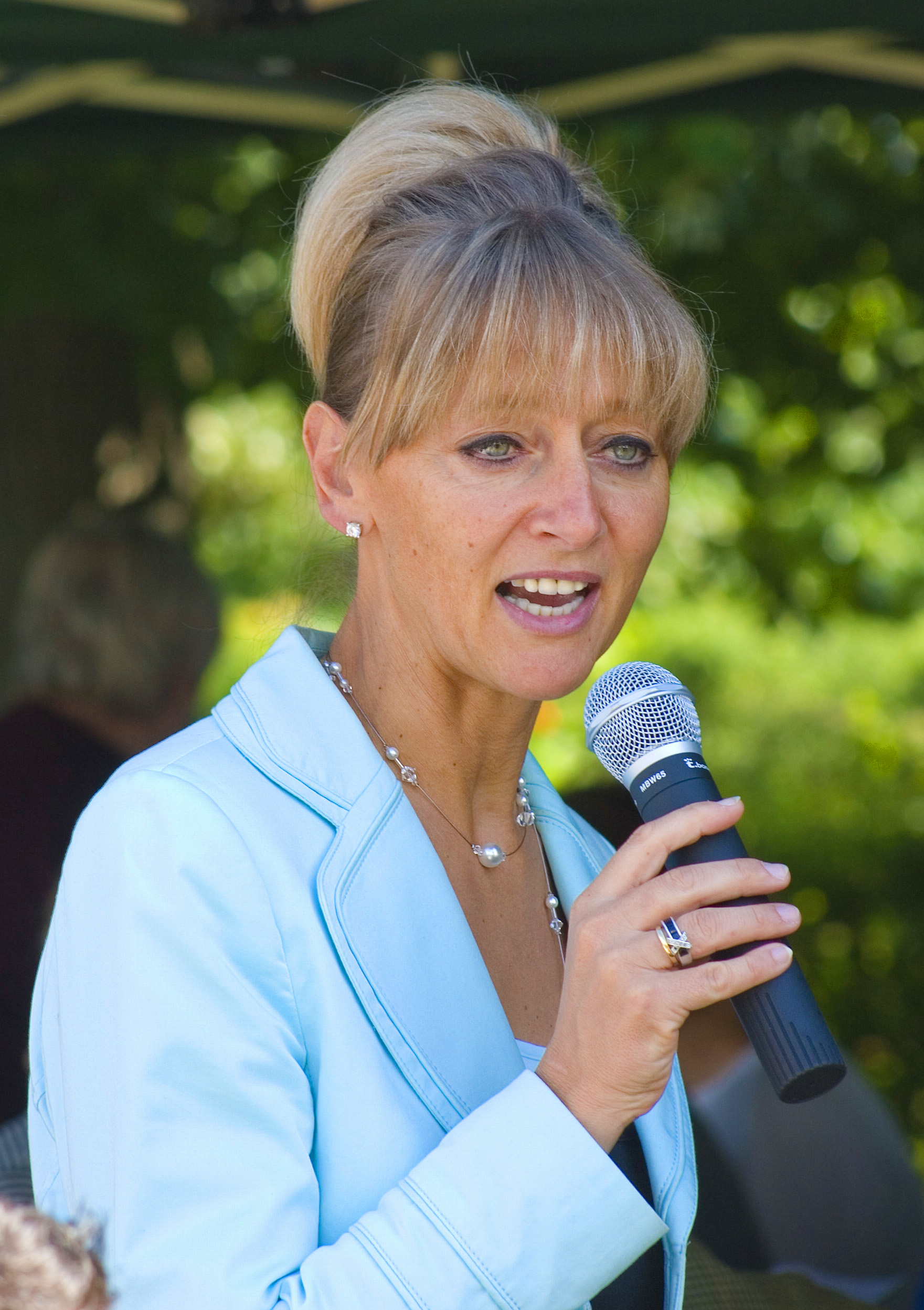 ehemalige Würzburger Oberbürgermeisterin Dr. Pia Beckmann bei CSU Familiensommerfest in Würzburg